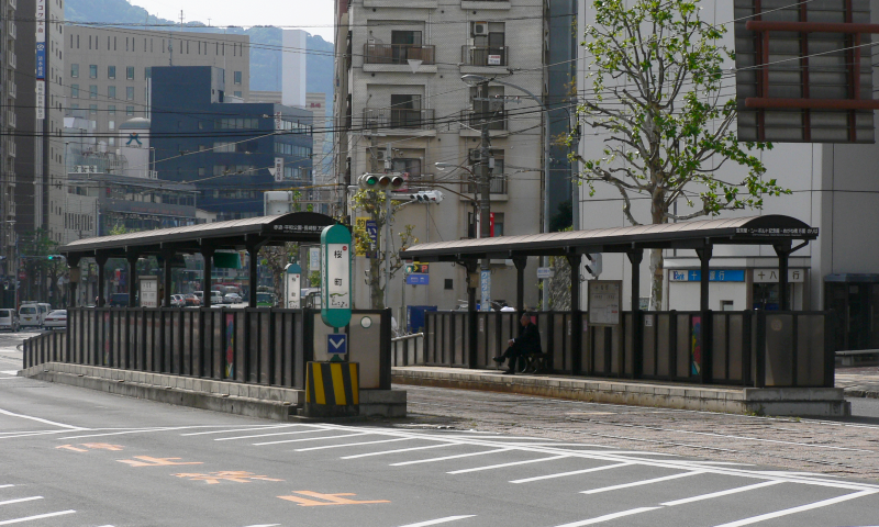 長崎電気軌道、桜町電停